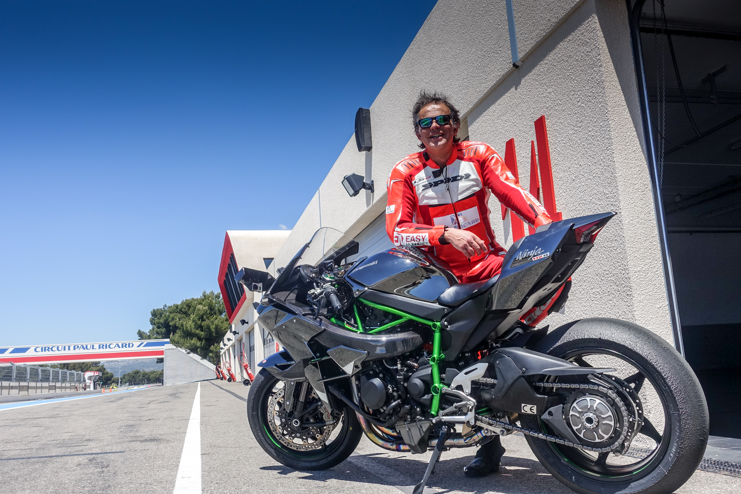 357km/h au Paul Ricard sur la Kawasaki H2R